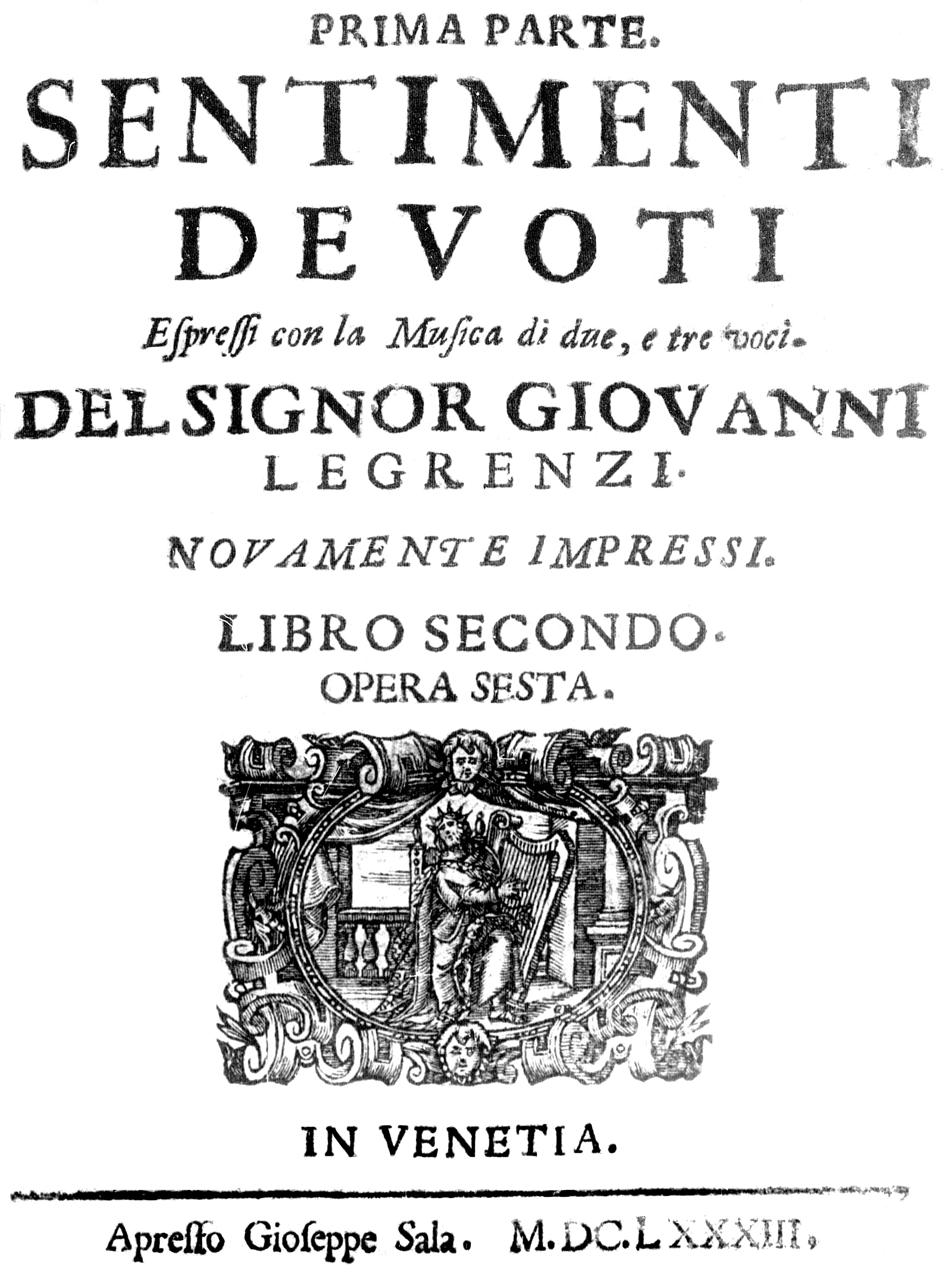 Sentimenti devoti, espressi con la musica di due, e tre voci, del signor Giovanni Legrenzi, novamente impressi. Libro secondo. Opera sesta.